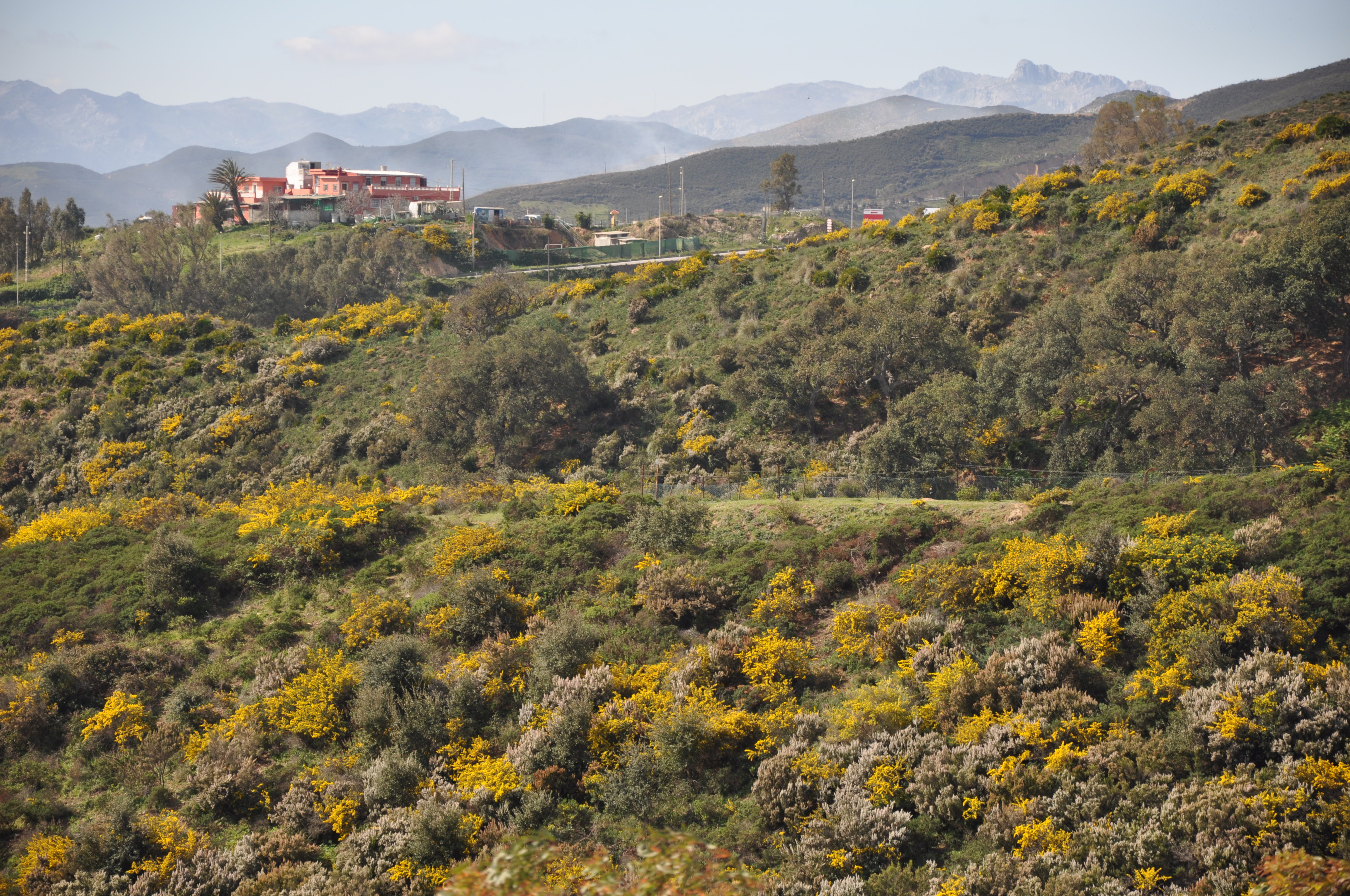 Matorral mediterréneo en el noroeste de África.